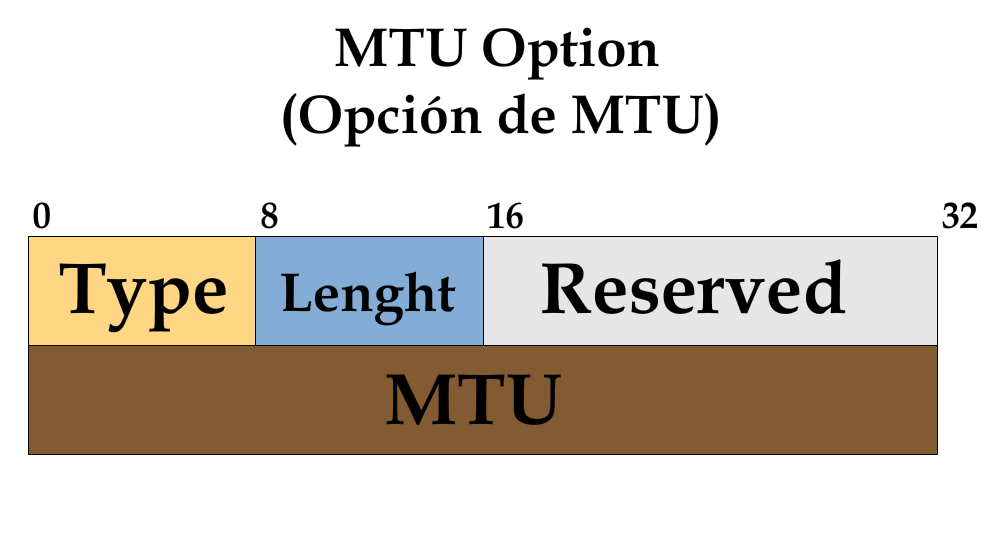 Formato de mensaje de opción ICMPv6 sobre la MTU.